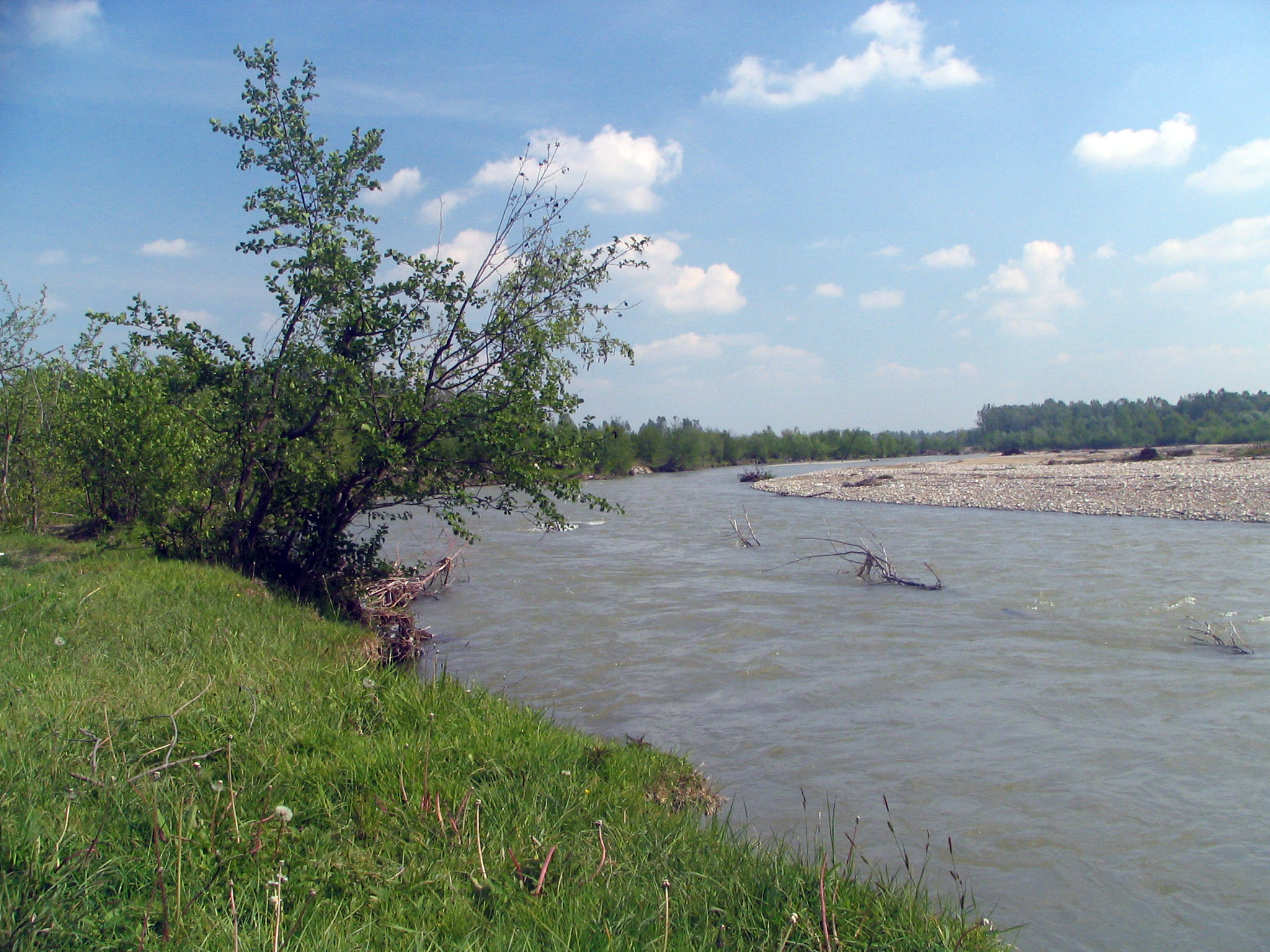 Dâmboviţa River, Măneşti, România Approx 44°57'22"N 25°17'57"E